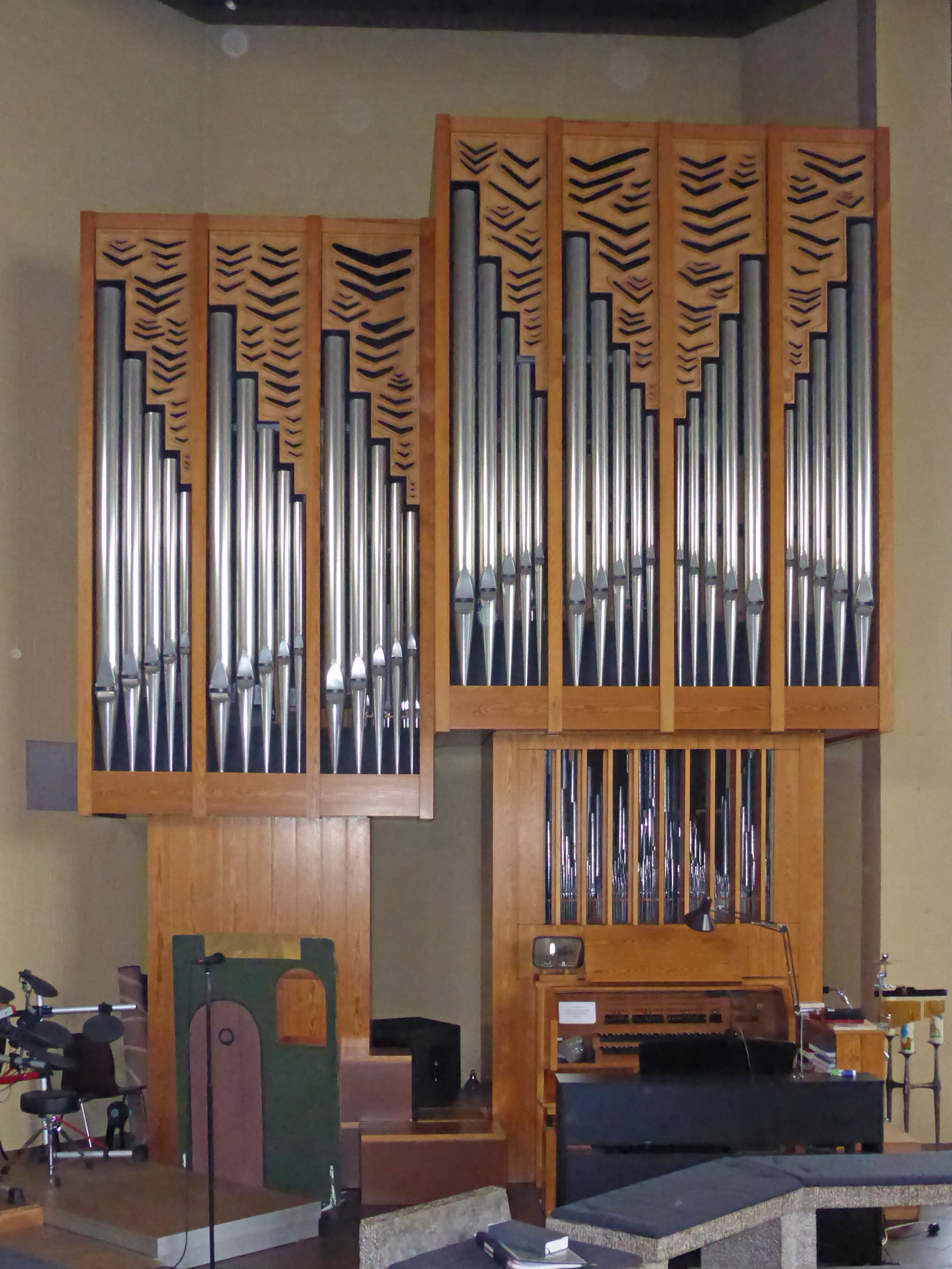 Orgel in der St. Raphael-Kirche in Wolfsburg.